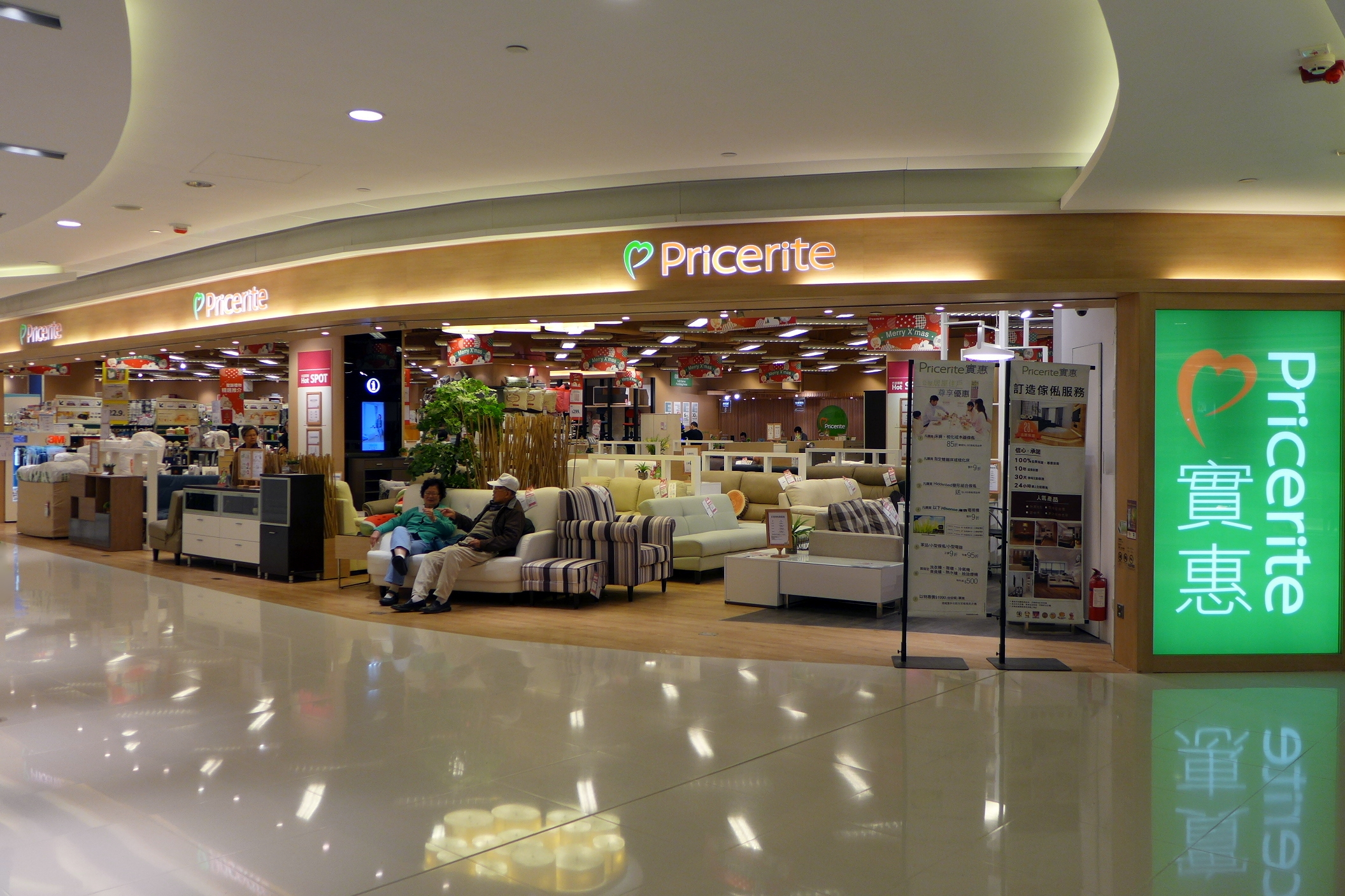 Priceline Metro CityPlaza Store